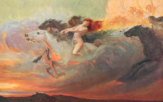 Le Crépuscule